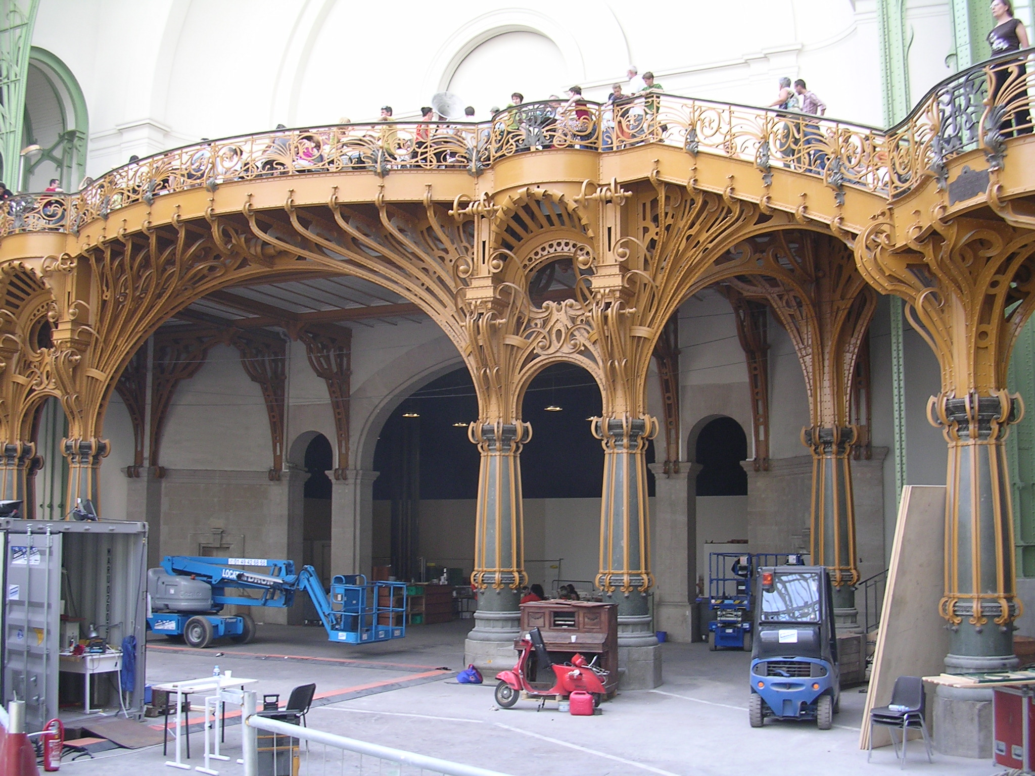 Auteur Piero d'houin Inocybe